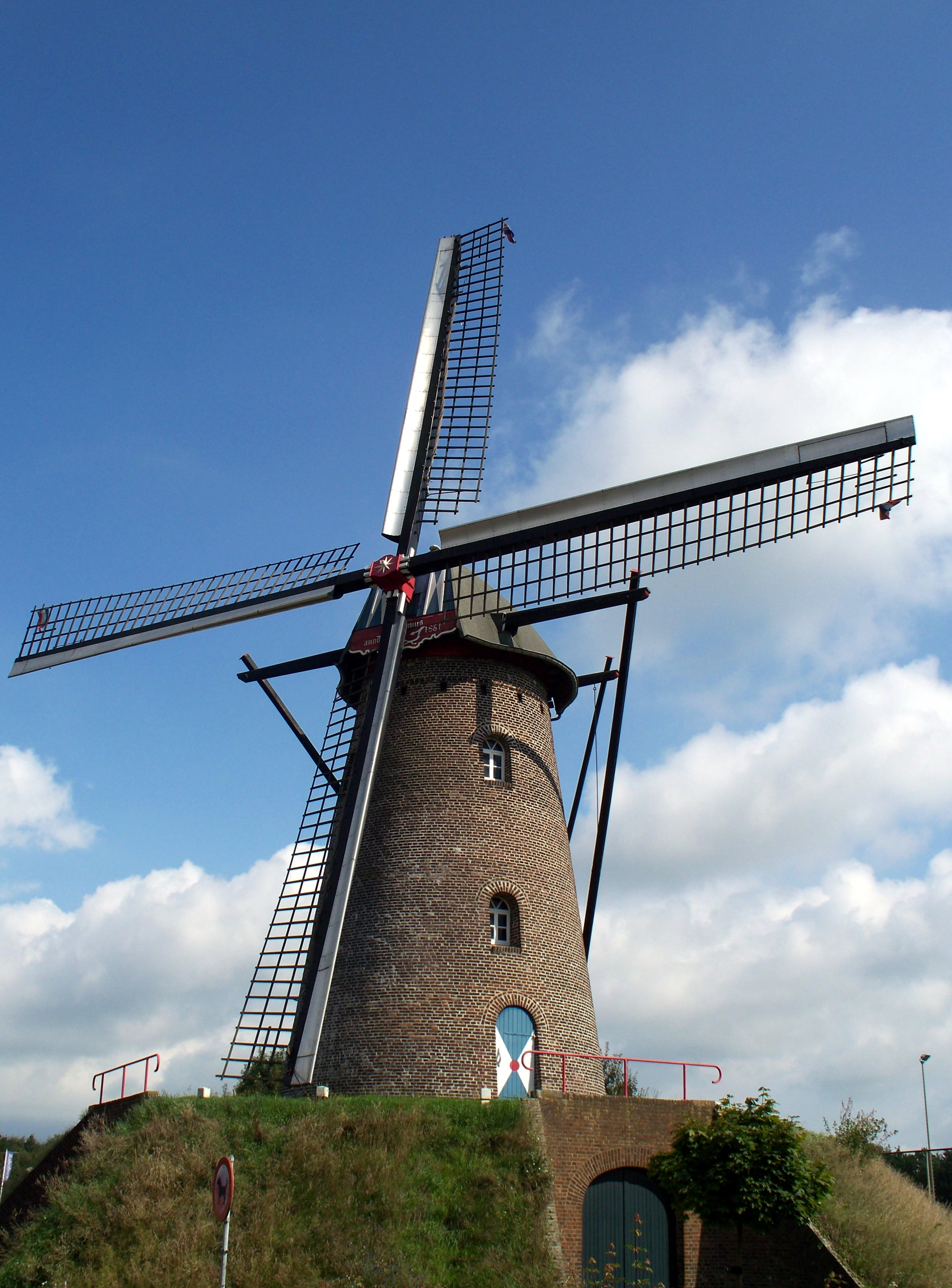 Windmolen Sint Antonius te Heythuysen-Areven, St. Antoniusstraat